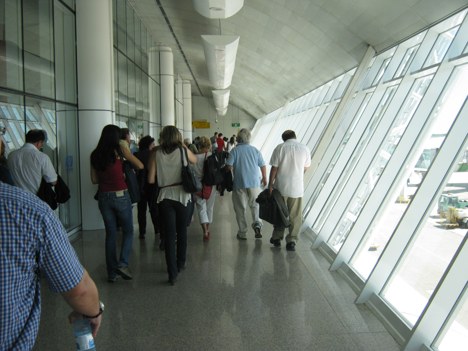 Passageiros desembarcando no Aeroporto Internacional Augusto Severo em Natal, RN, Brasil.